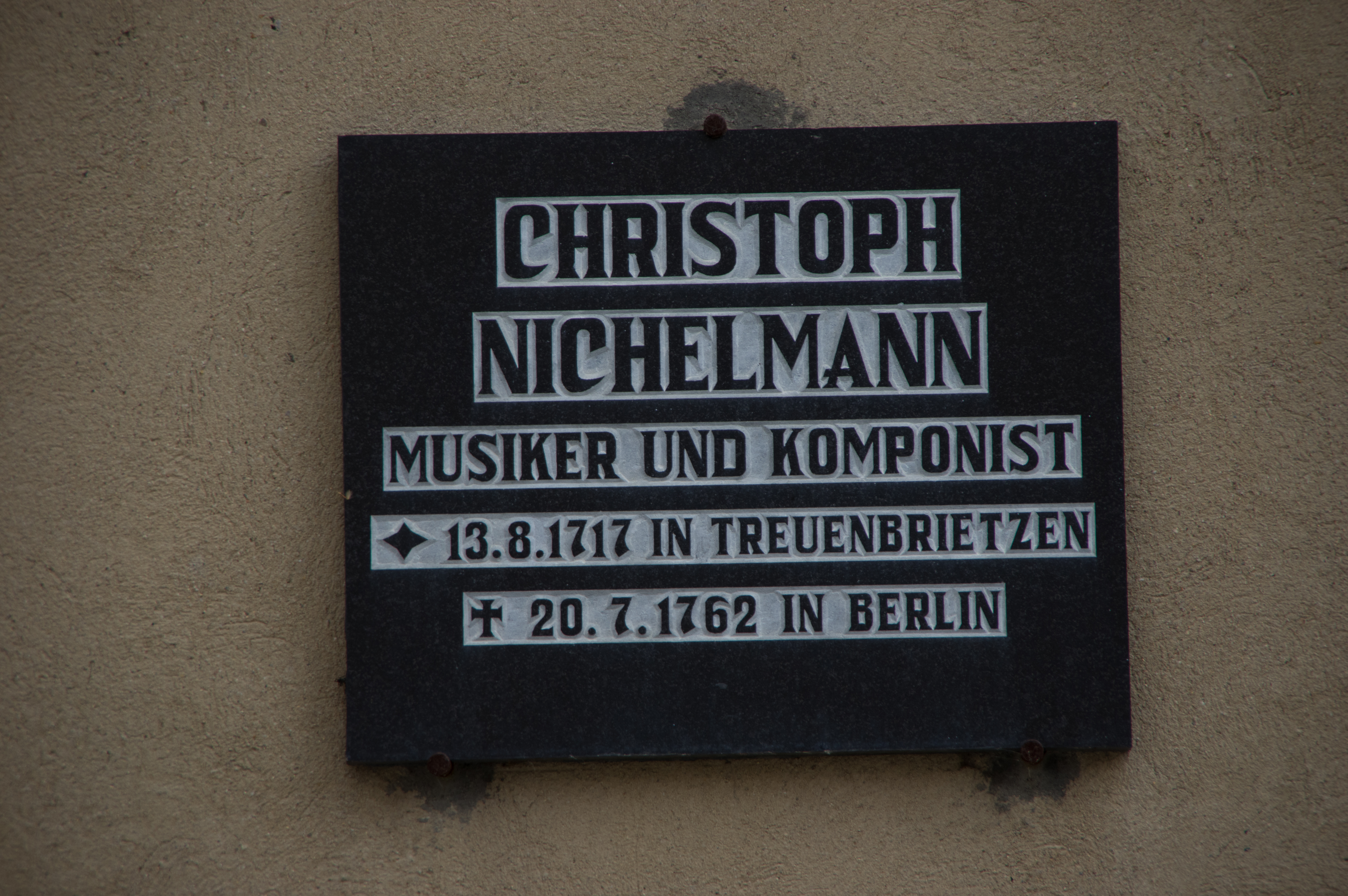 Treuenbritzen in Brandenburg. Das Schild an dem Haus Neue Marktstraße 91 steht unter Denkmalschutz.